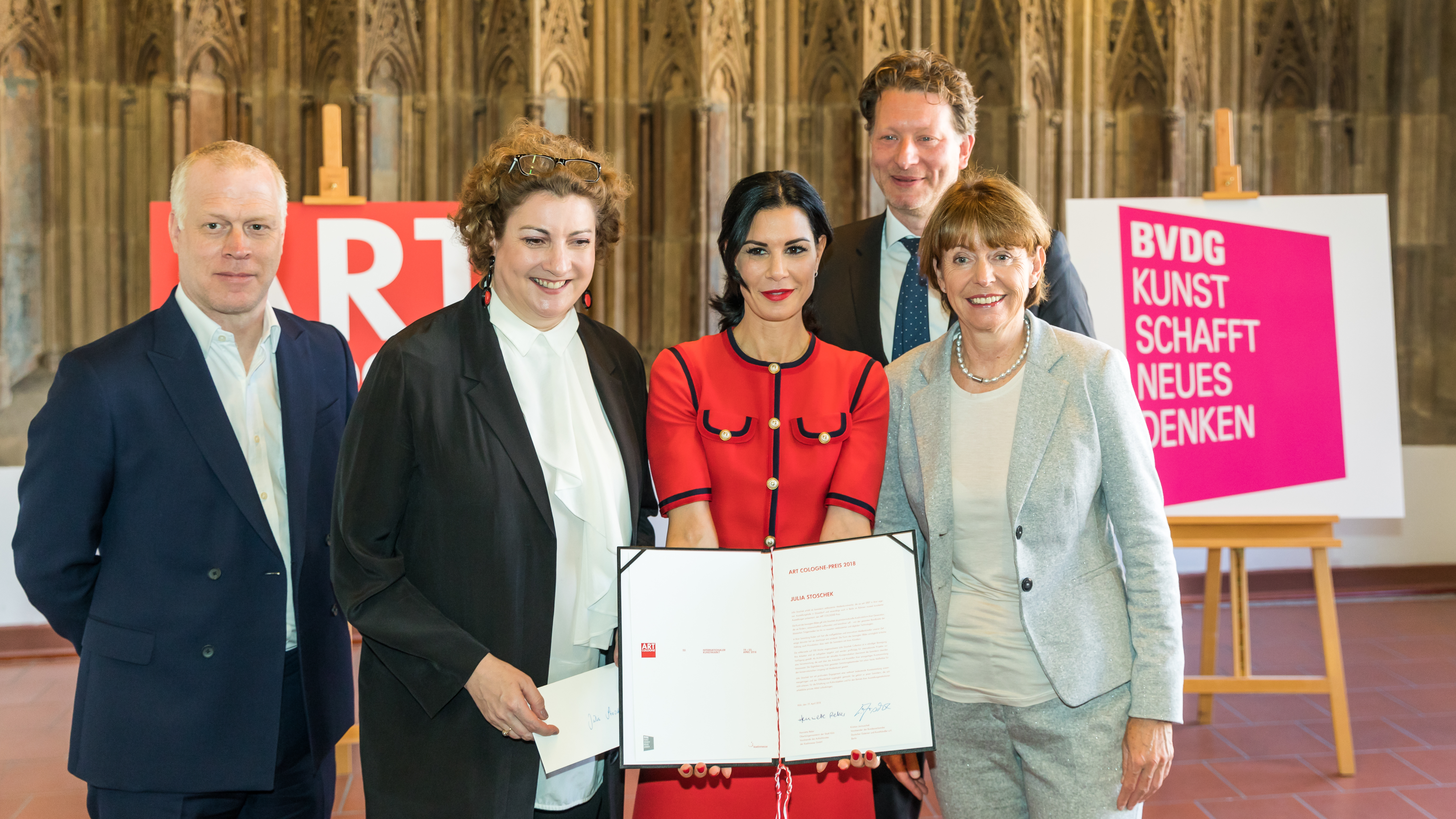 Verleihung des Art Cologne Preises 2018 an die Kunstsammlerin Julia Stoschek im Hansasaal des Historischen Rathauses von Köln